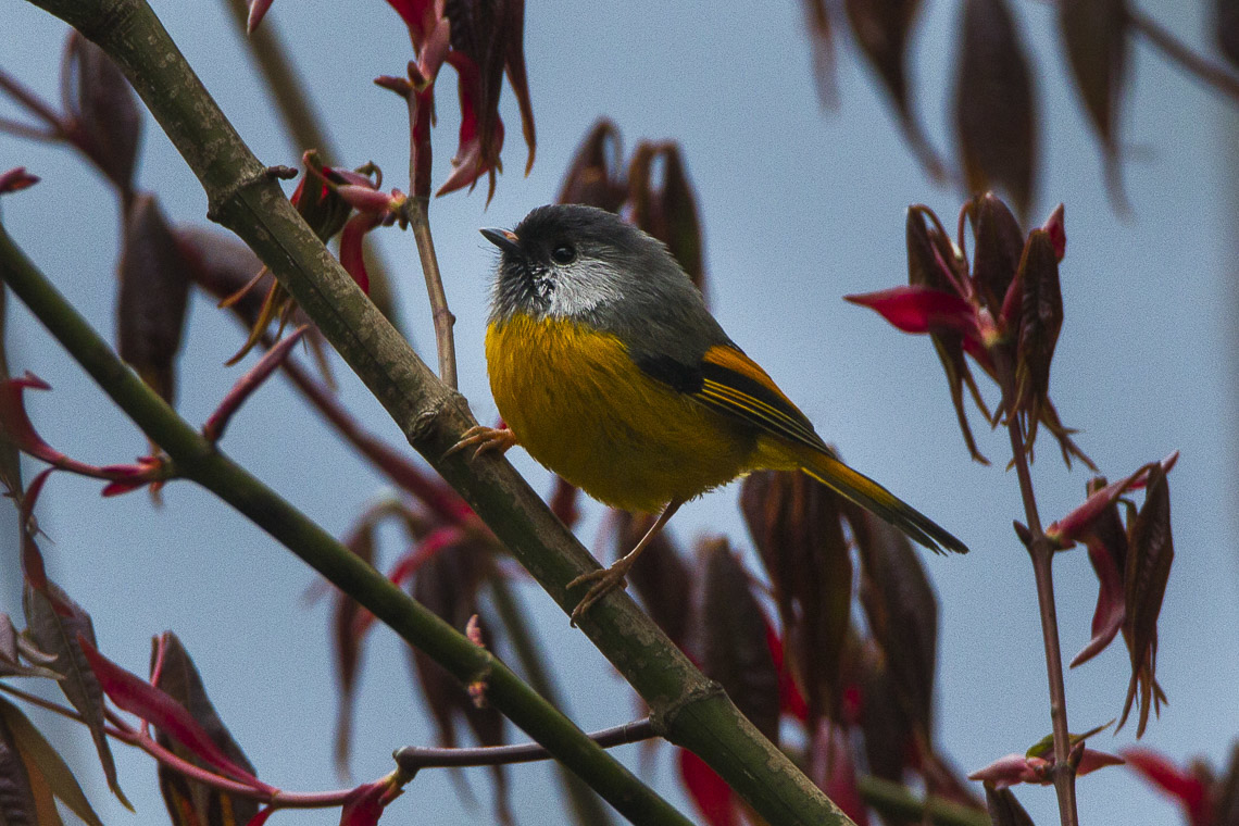 Golden-breasted Fulvetta - Bhutan_S4E0339